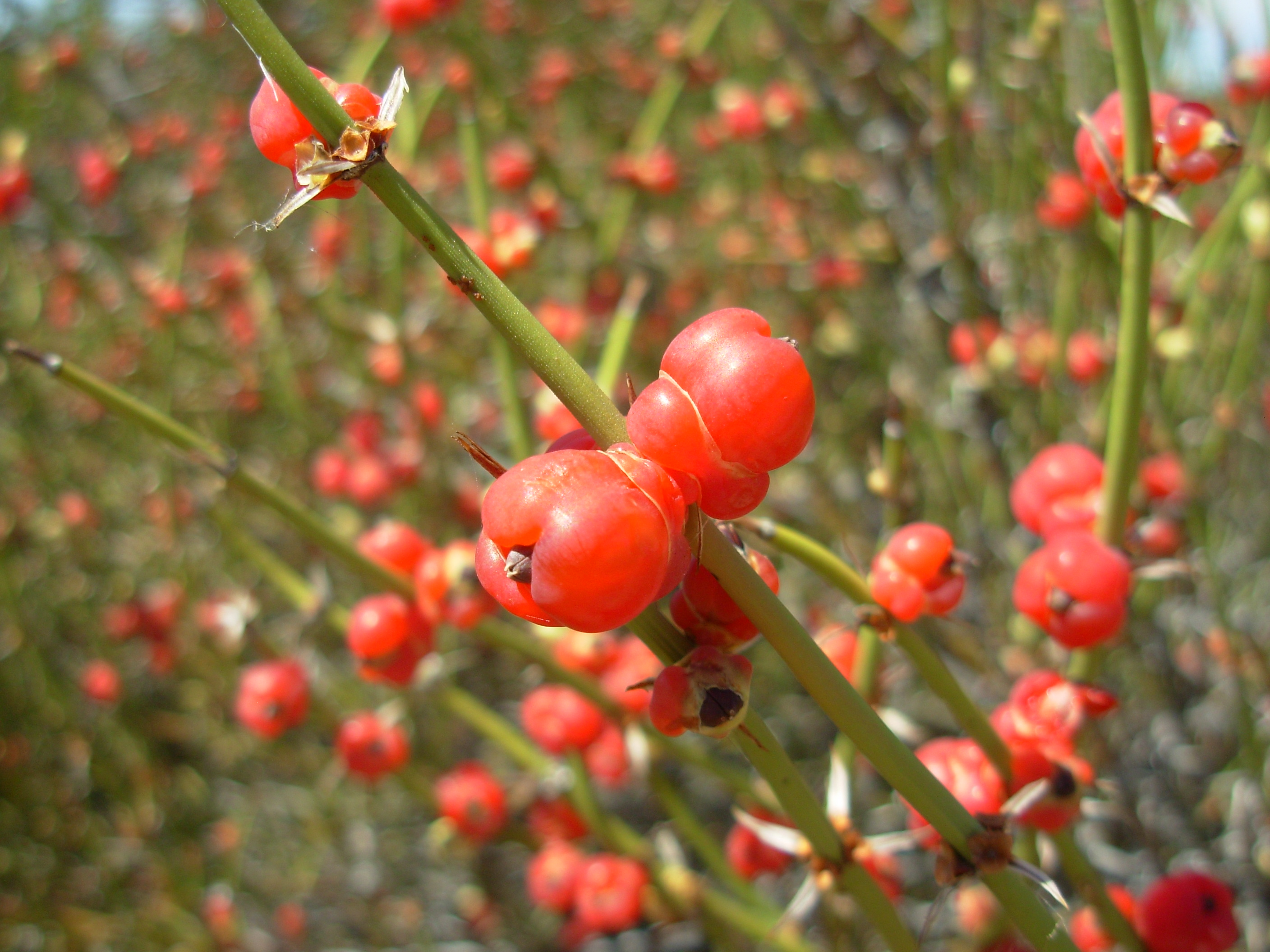 Detalle del estróbilo femenino de la especie.